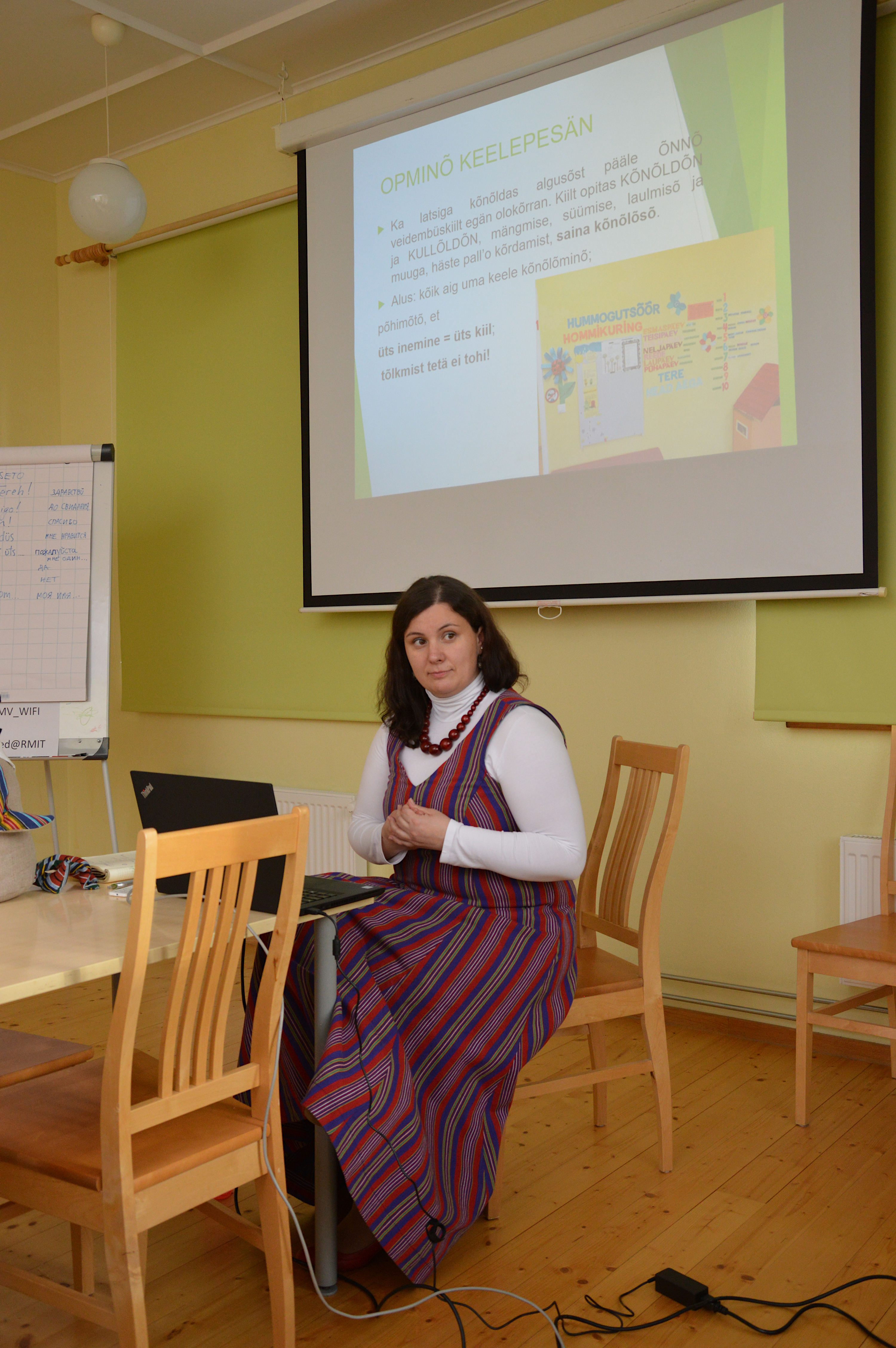 Keelepesade kontseptsiooni tutvustamine Võru Instituudis IV soome-ugri Vikipeediate seminari osalistele.